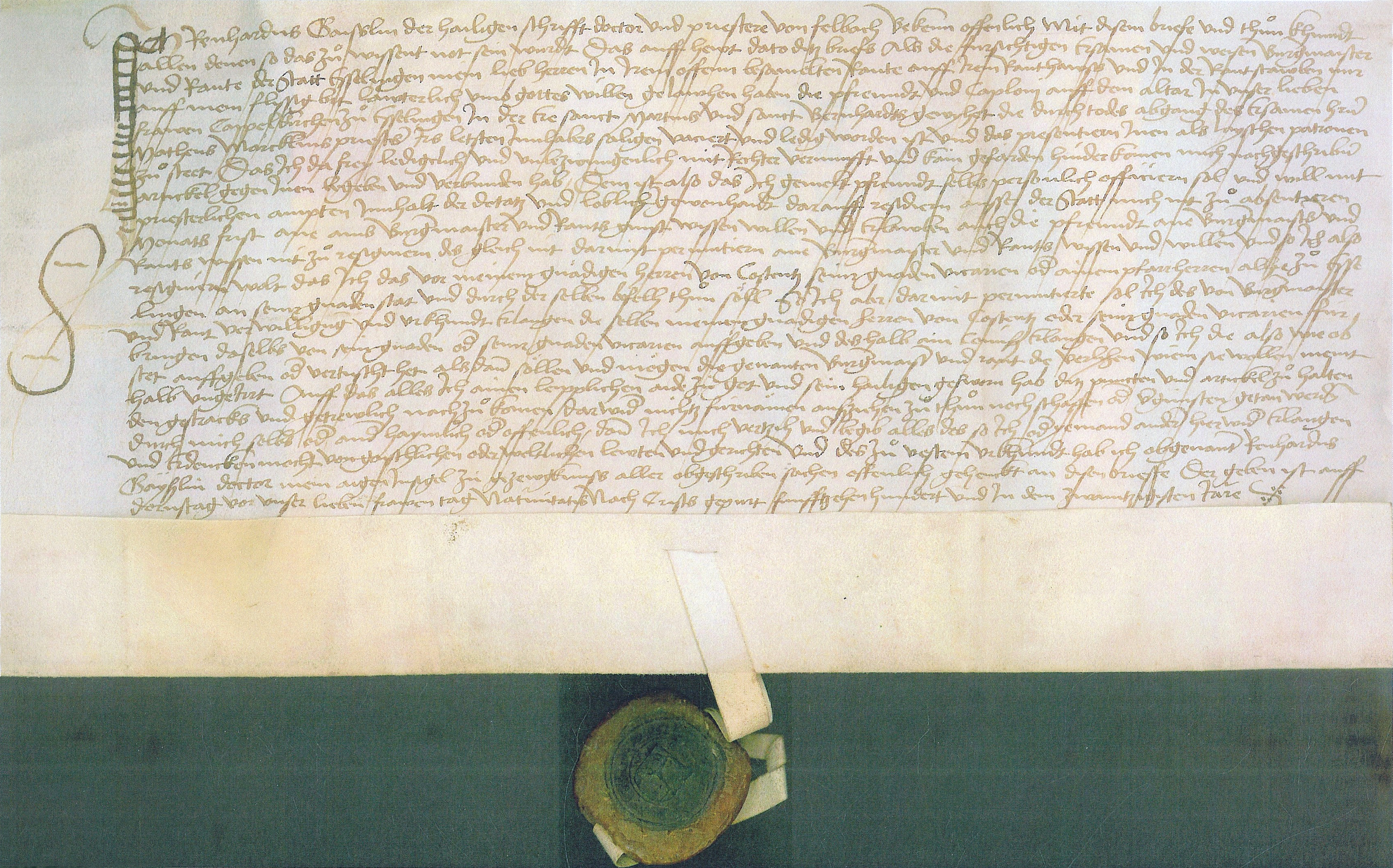 Verpflichtungserklärung Gaißers zur Kapellpfründe in der Esslinger Stadtkirche ("Frauenkirche") von 1520